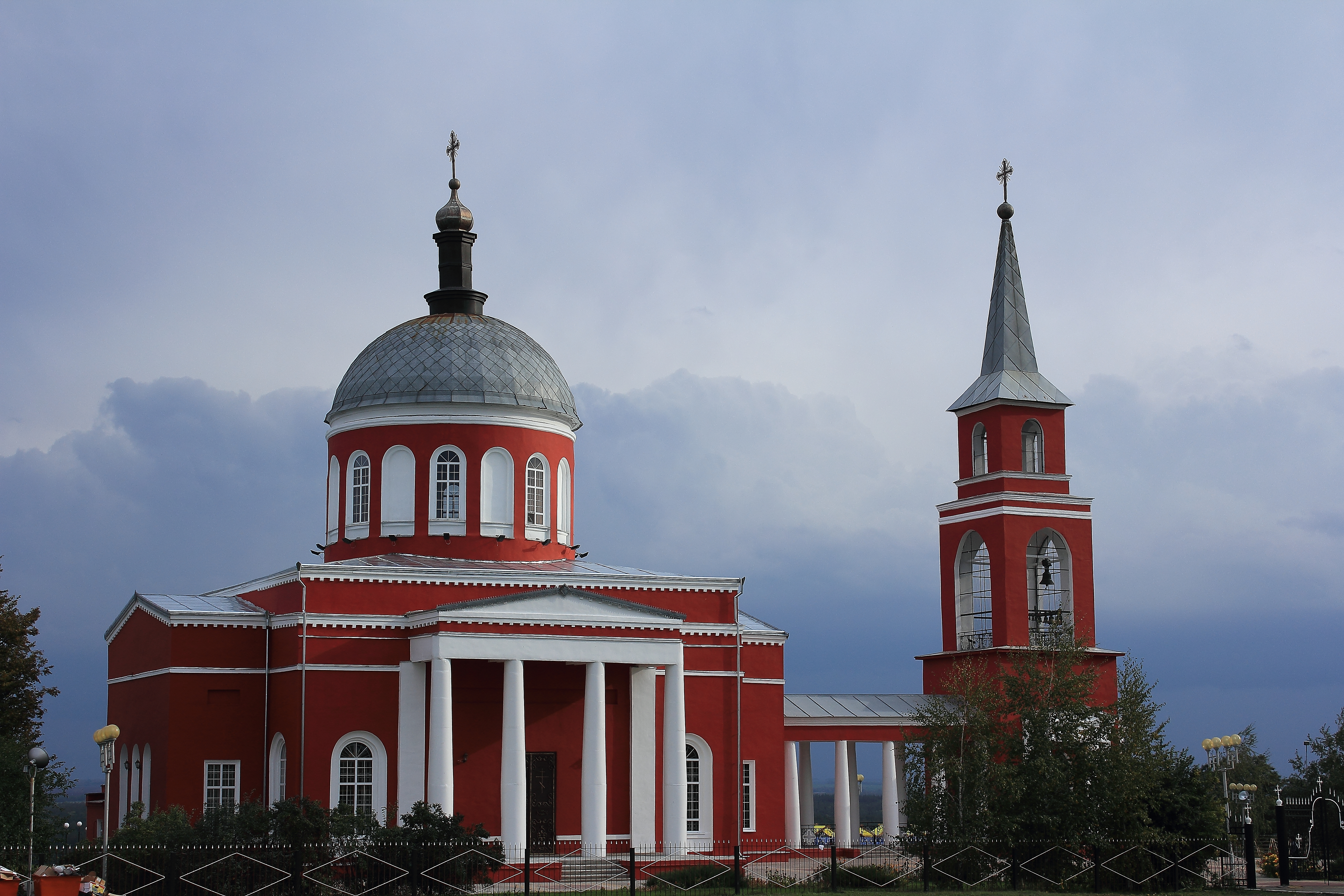 Воскресенская церковь (Белгородская область, Грайворон, село хотмыжск)